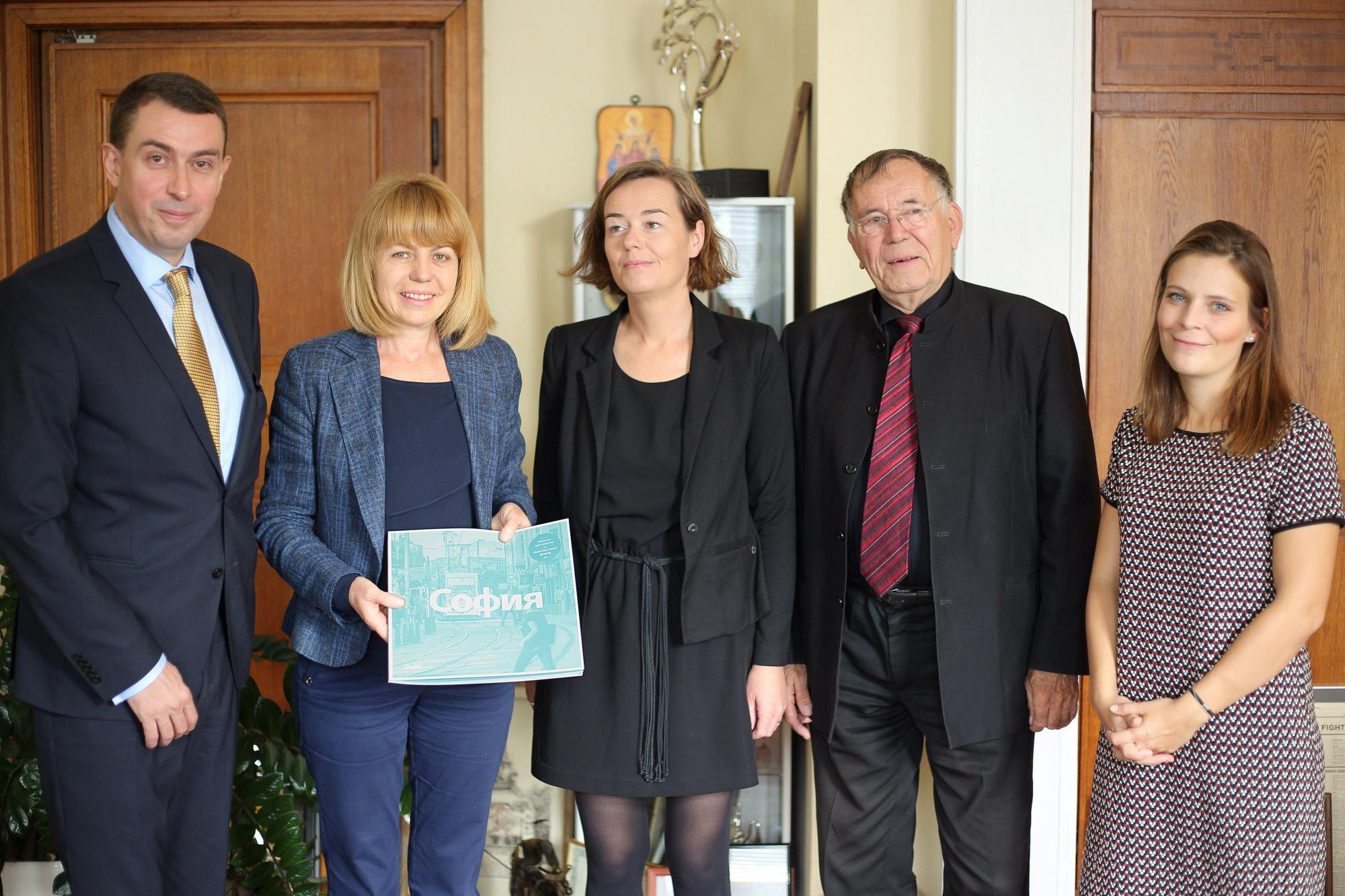 Представяне на доклада "София - град за хората"